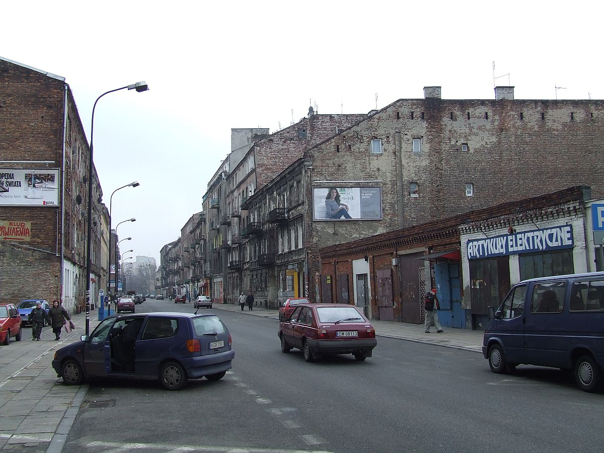 Ulica Brzeska w Warszawie